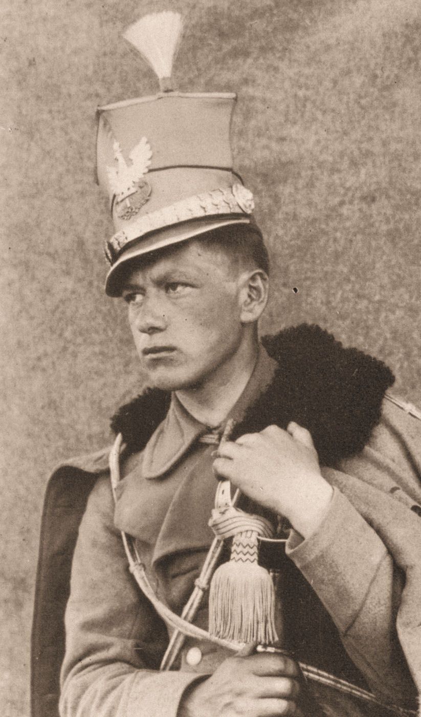 Józef Mączka (1888-1918) legionista 2 Pułku Ułanów, żołnierz POW i poeta.